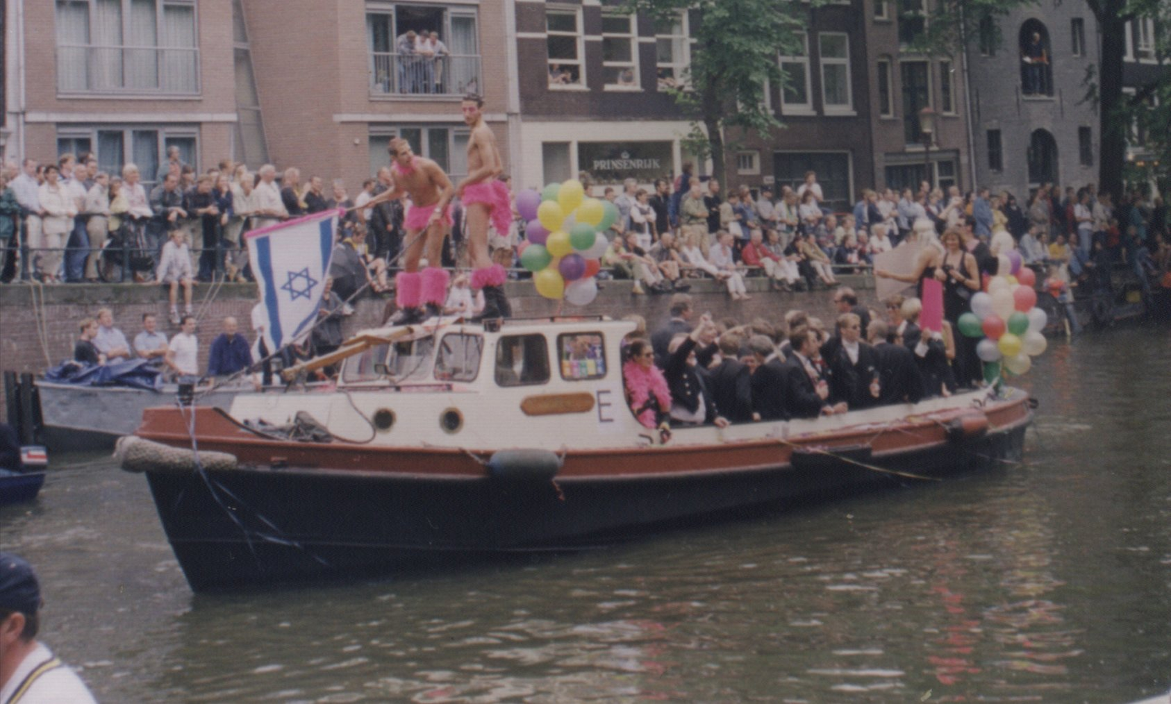 מצעד הסירות" בתעלות של אמסטרדם, לפני טקס הפתיחה של המשחקים הגאים, 1998"